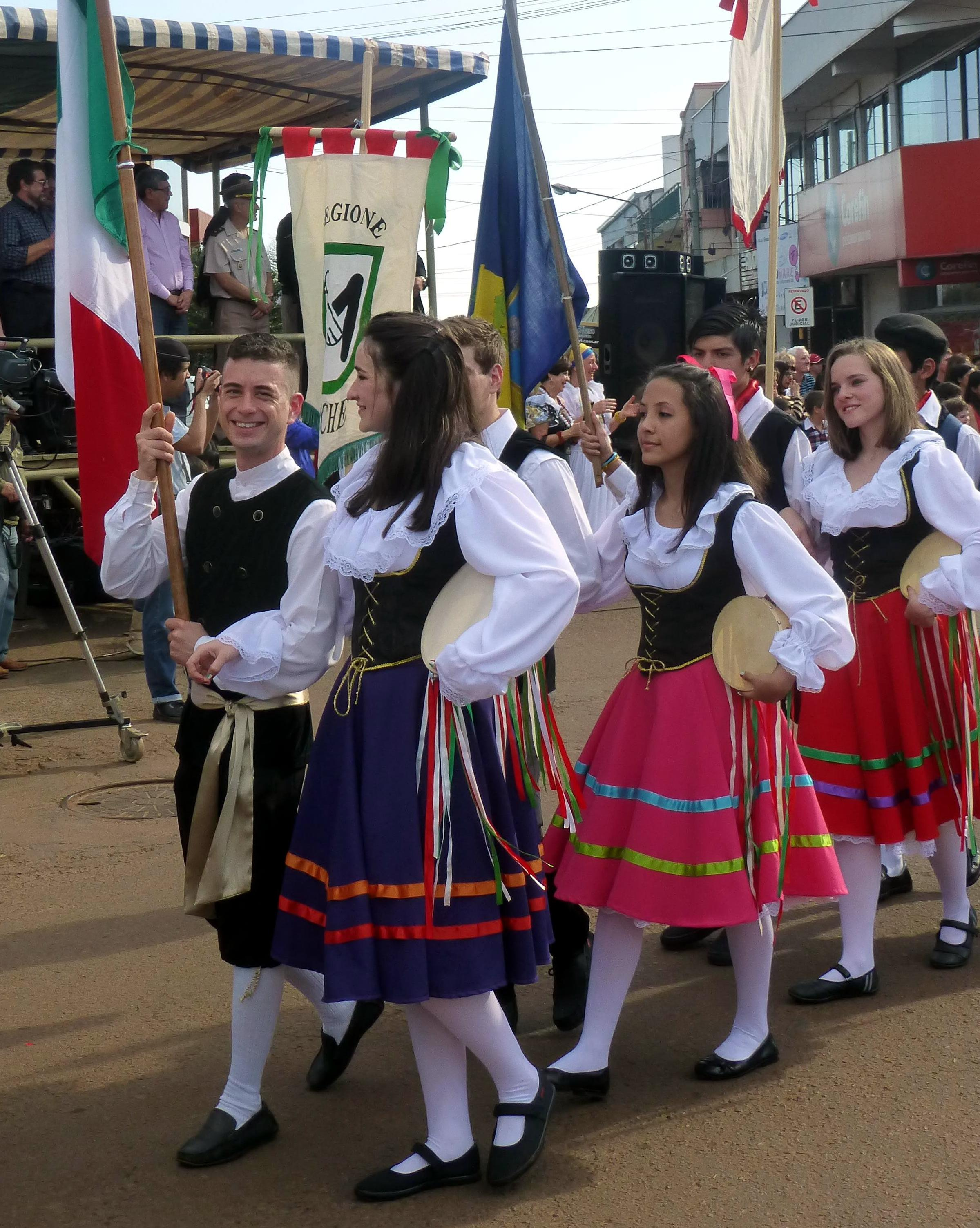 Colectividad italiana durante el desfile de inauguración de la XXXIV Fiesta Nacional del Inmigrante.